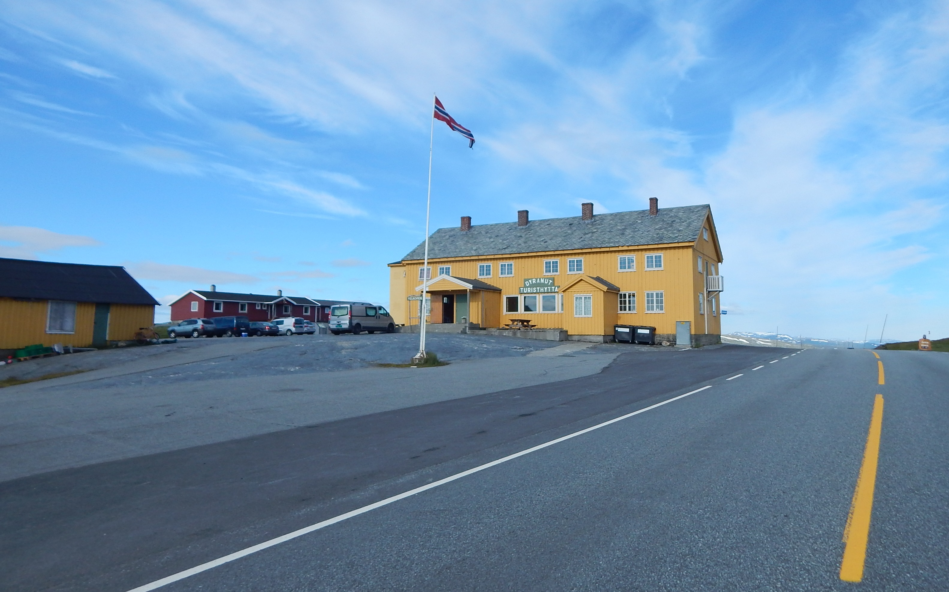 Riksvei 7 forbi Dyranut fjellstue